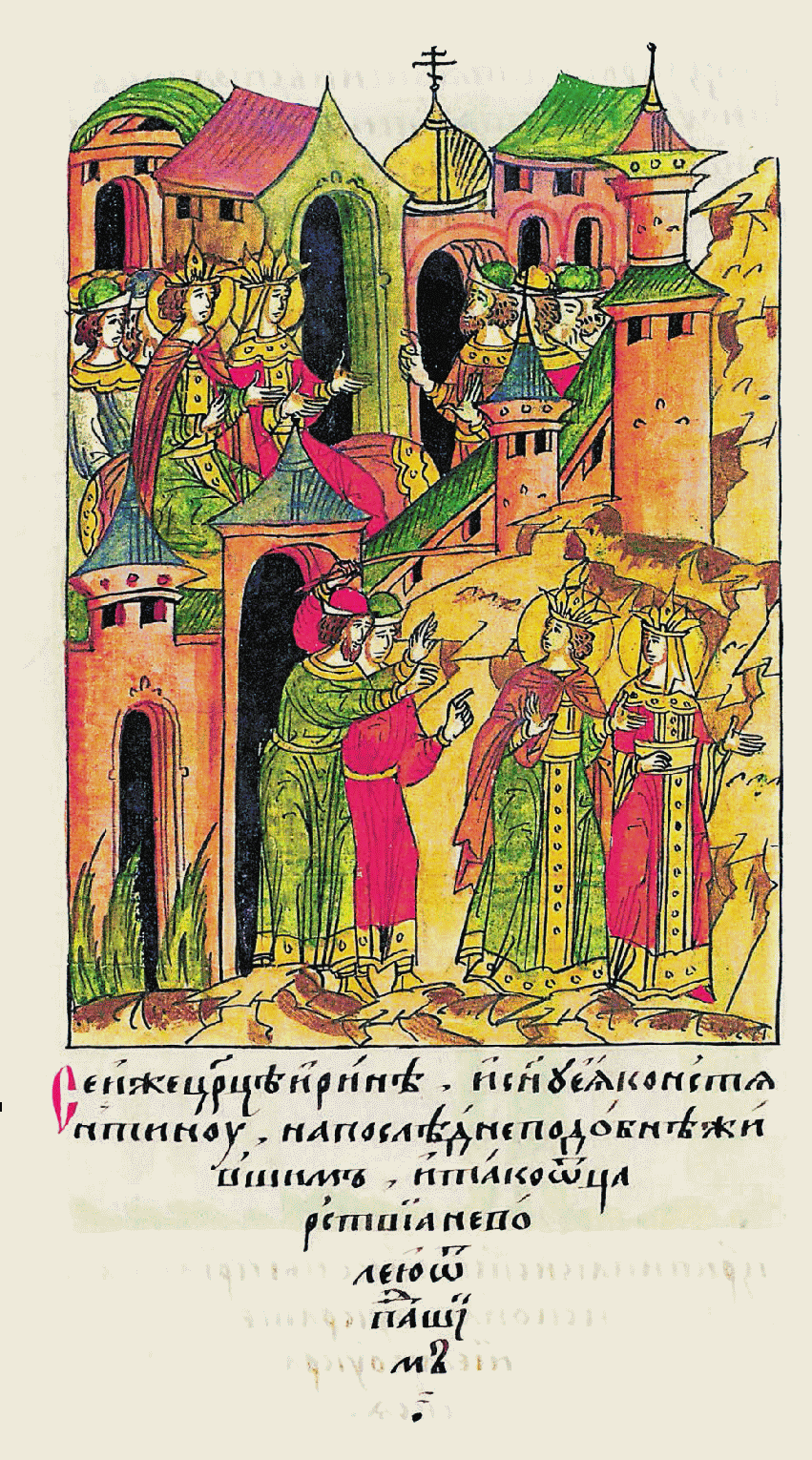 Эта царица Ирина и ее сын Константин позднее неправедно жили и не по своей воле отпали от цар- ства.